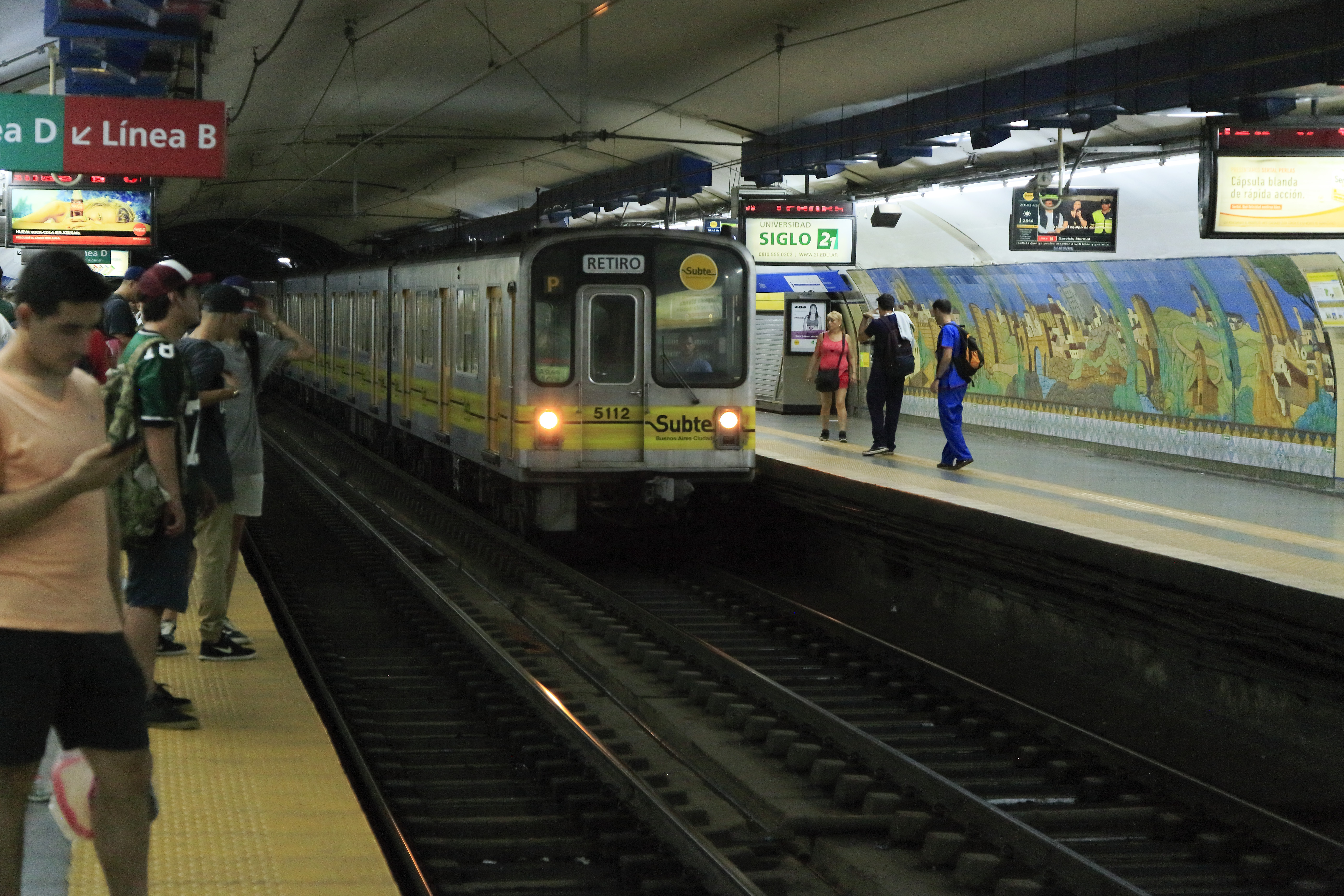 Zug der Linie C nach Retiro, auch diese Wagen stammen aus Nagoya. Für den Betrieb in Buenos Aires mussten sie von 600 auf 1500 Volt Gleichspannung und zusätzlich von Stromschienen- auf Fahrleitungsbetrieb umgebaut werden. Die Sechswageneinheiten sind in der Mitte teilbar, dort gibt es Hilfsfahrpulte und die entsprechenden Wagenübergänge sind mit Türen verschlossen. Die Endwagen sind fahrmotorlose Steuerwagen.